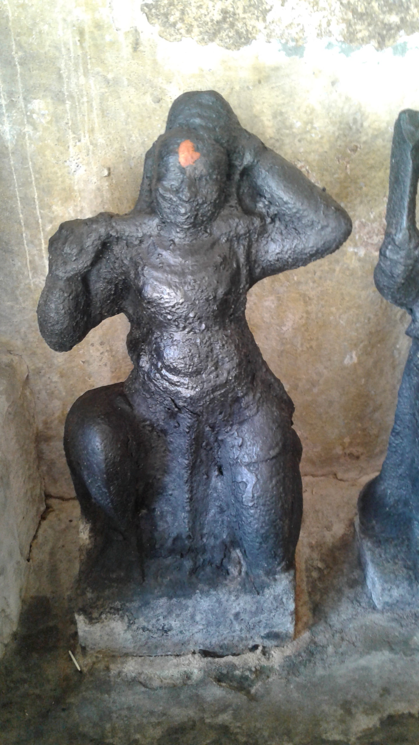 அரிகண்ட சிற்பம் திருவாசி மாற்றுரைவரதேசுவர் கோயிலின் பிரகாரத்தில்